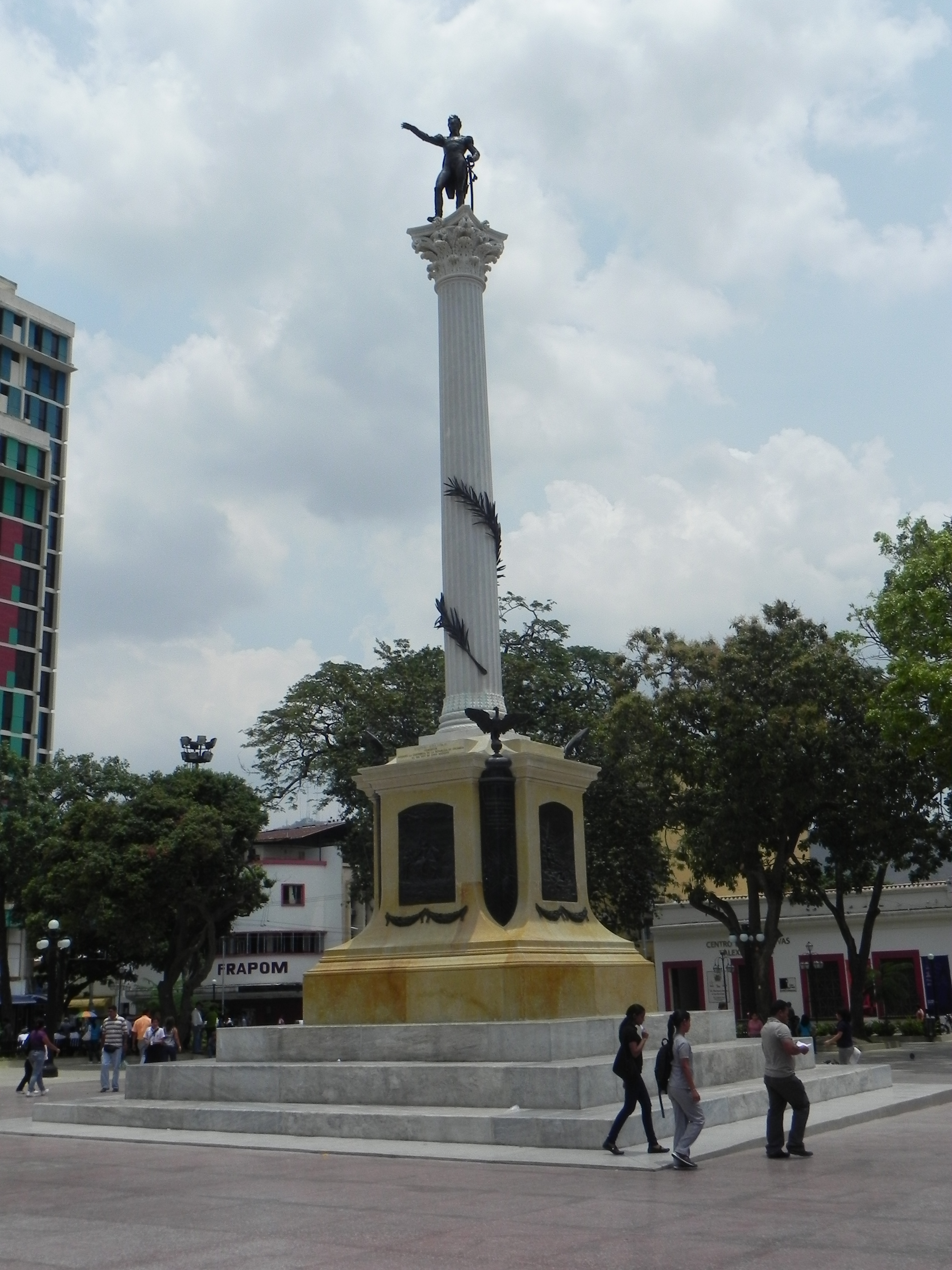 Monolito